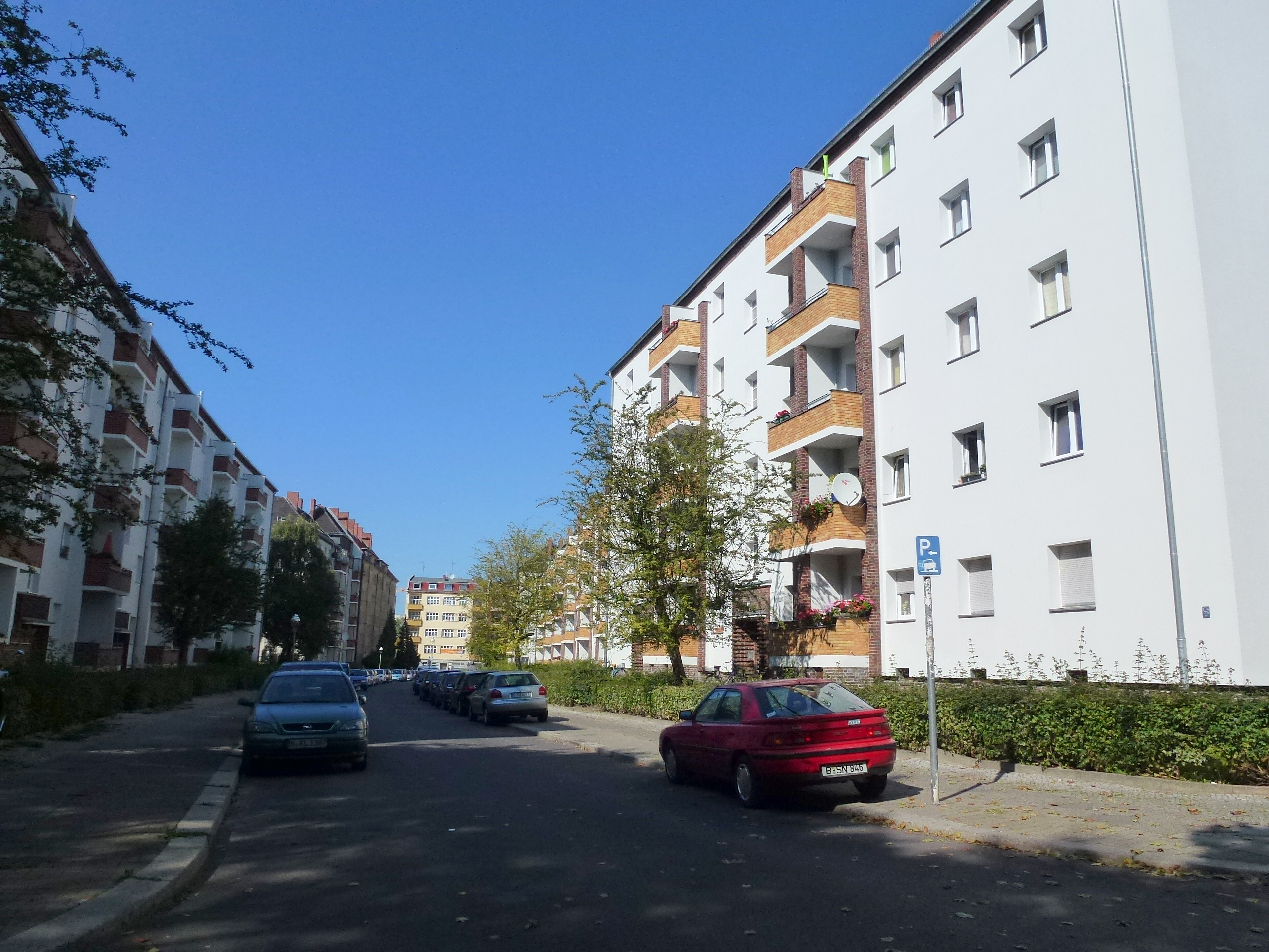 Berlin-Tempelhof Höhndorfstraße